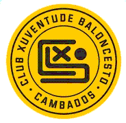 Escudo Club Xuventude Baloncesto